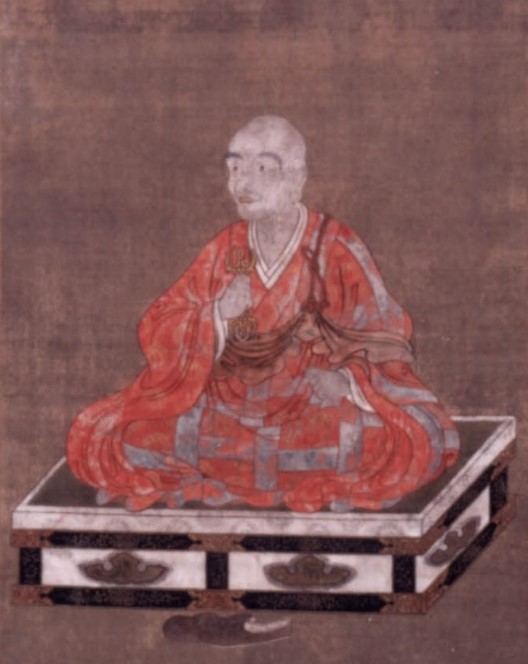 亮賢の頂相。